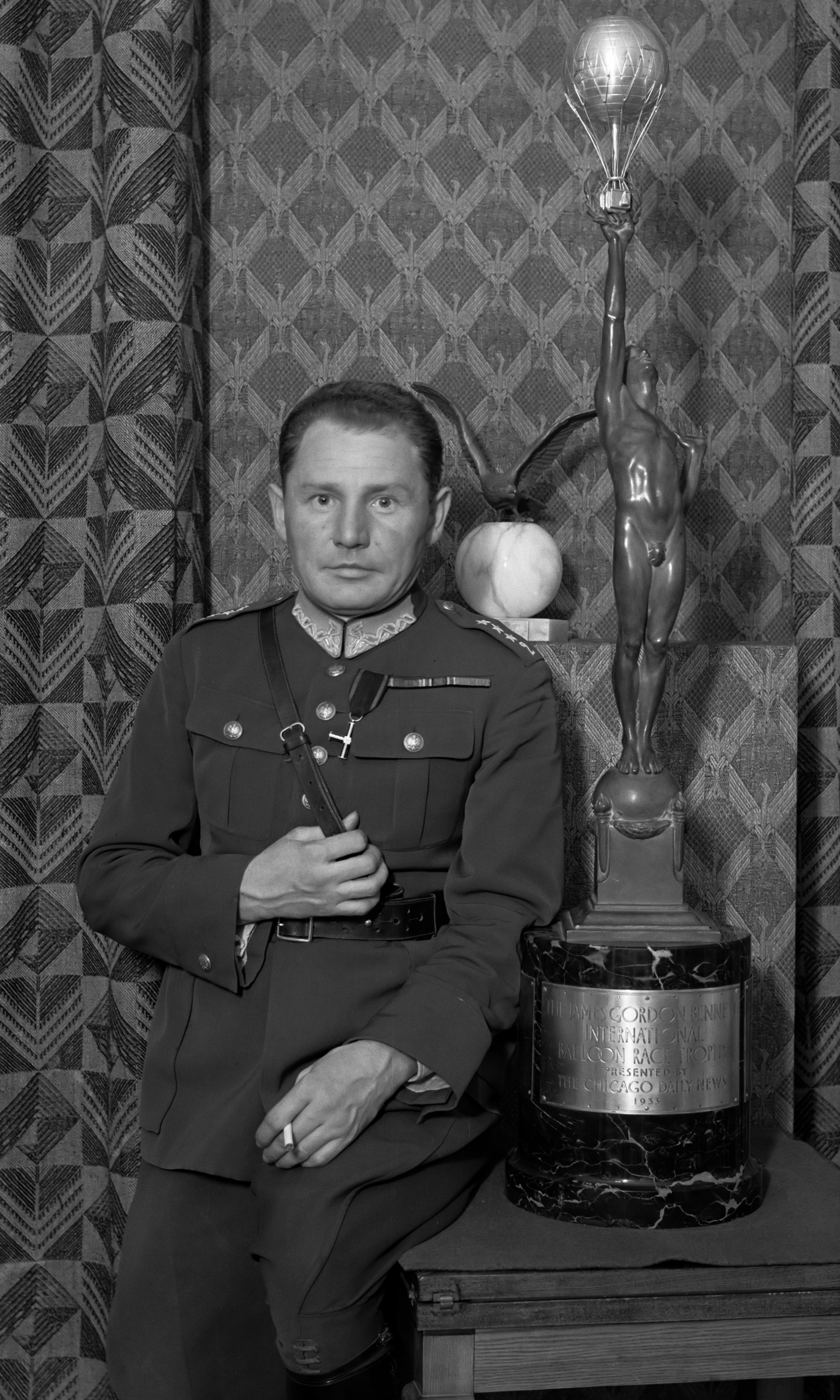 Warschau. Portret van de luchtmachtkapitein en ballonvaarder Franciszek Hynek (1897-1958) zittende naast de Gordon Bennett Cup 1934